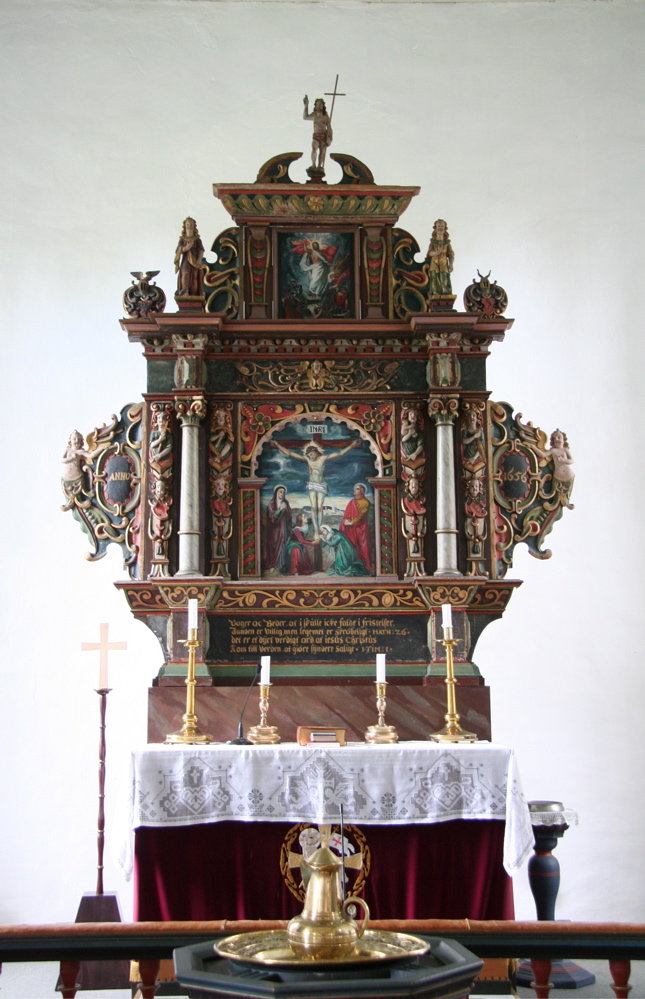 Selbu Church altar